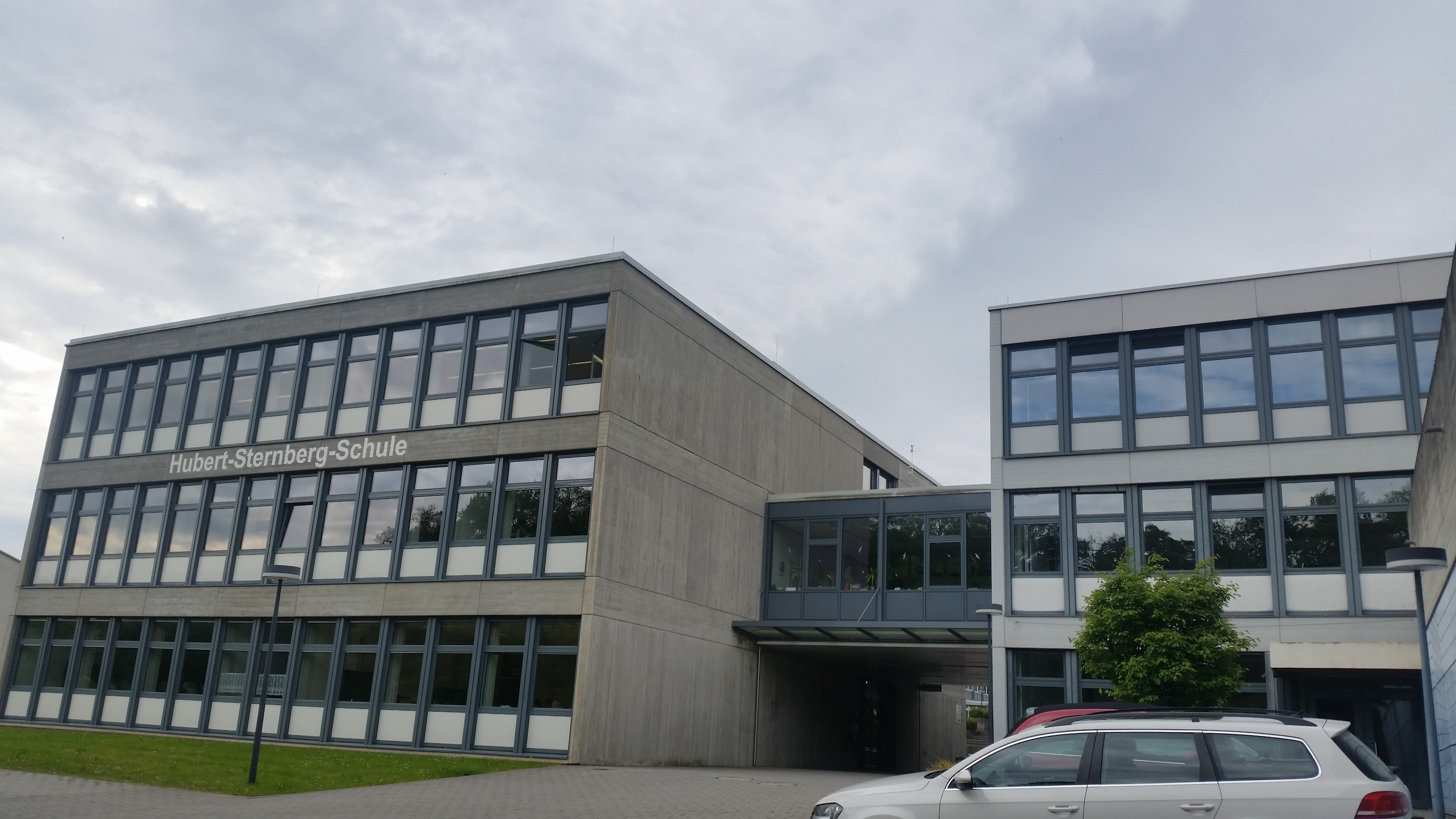 Die gewerbliche Hubert-Sternberg-Schule in Wiesloch von der Parkstraße aus gesehen